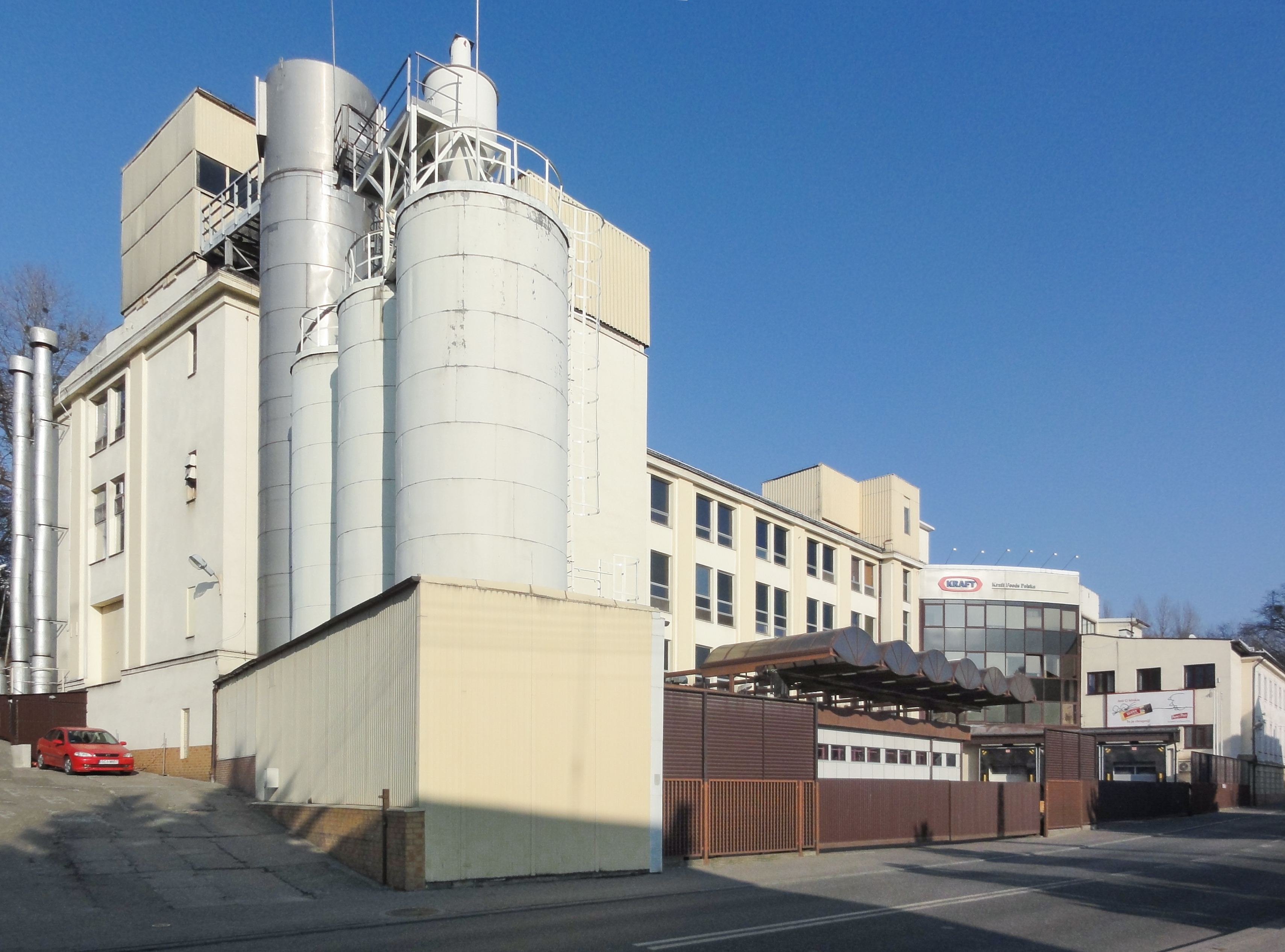 Historia zakładu rozpoczyna się w 1921 roku, kiedy bracia Brunon i Wilhelm Schramek założyli na ulicy Głębokiej niewielką fabrykę wafli. Z czasem zakład rozrósł się i przeniósł do nowej siedziby przy ulicy Liburnia. Po wojnie fabryka została znacjonalizowana i weszła w skład Zjednoczenia Przemysłu Cukierniczego w Zabrzu. Zakład został przejęty w 1993 roku przez Kraft Jacobs Suchard.